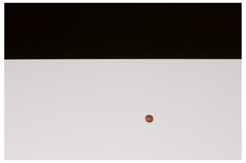 Таблетки 3